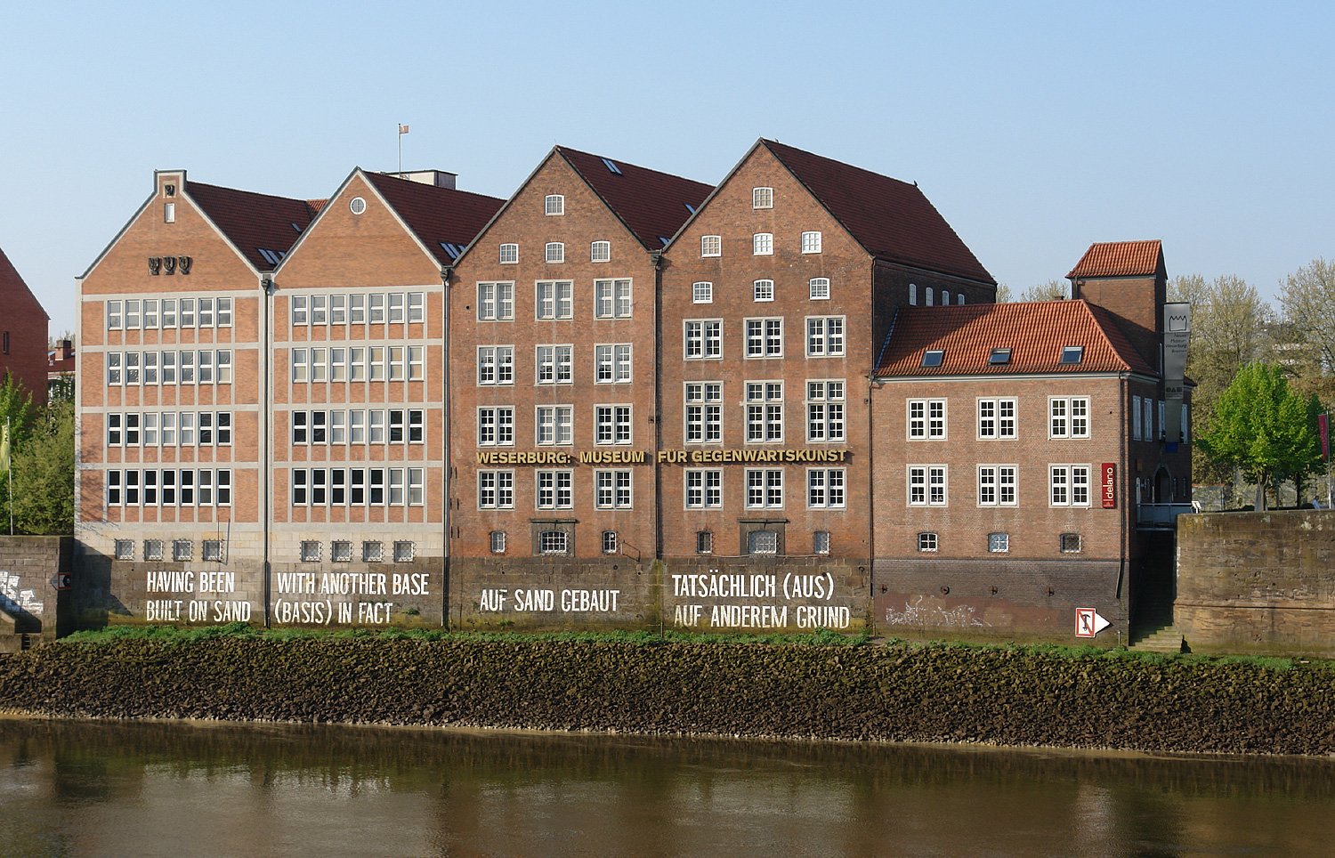 Neues Museum Weserburg auf dem Teerhof in Bremen. Blick von der Schlachte